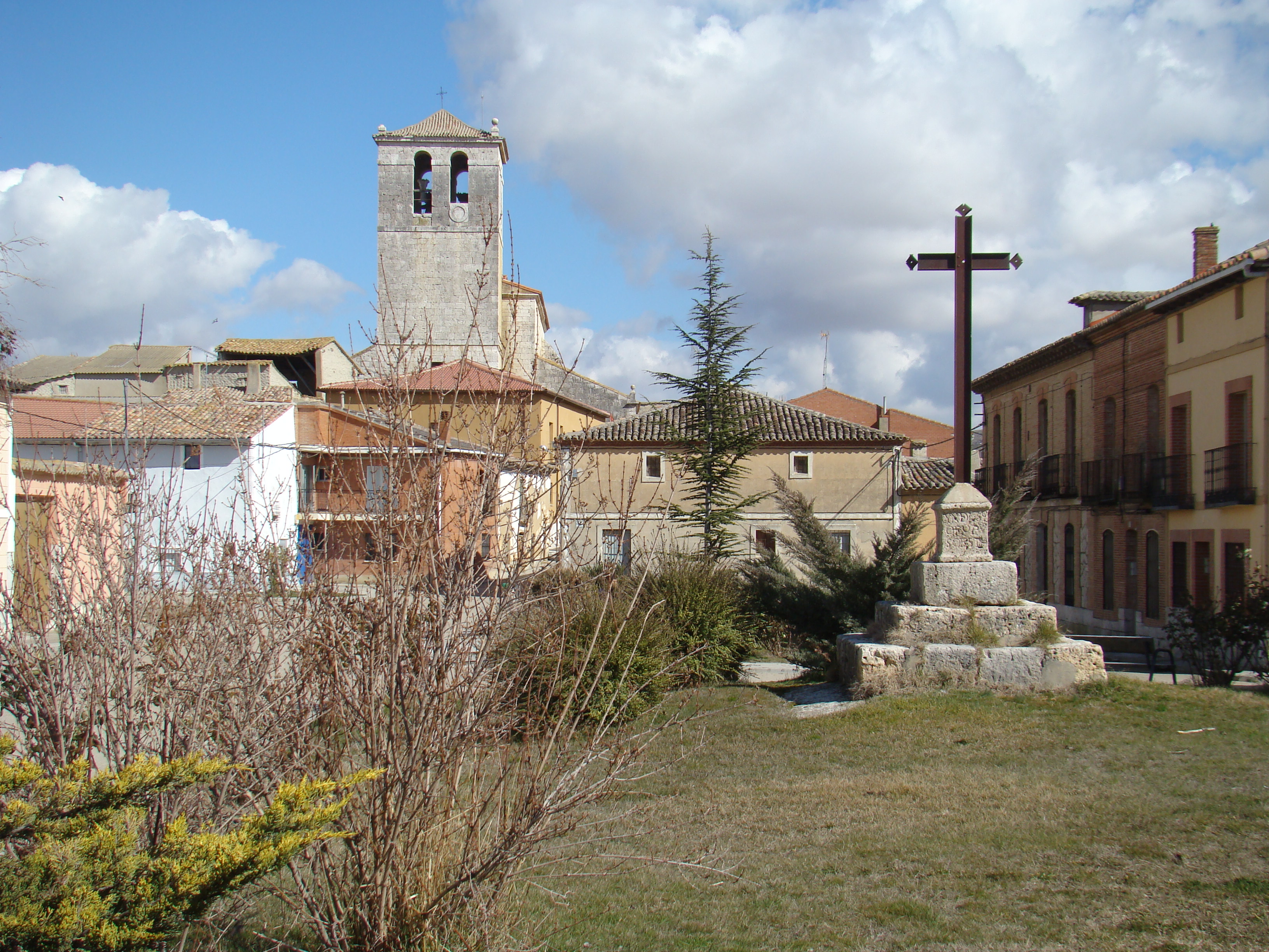 Bercero, provincia de Valladolid en España. Ermita del Cristo. Cruz de piedra delante de la portada, fechada en 1647, con una cruz de dominicos.